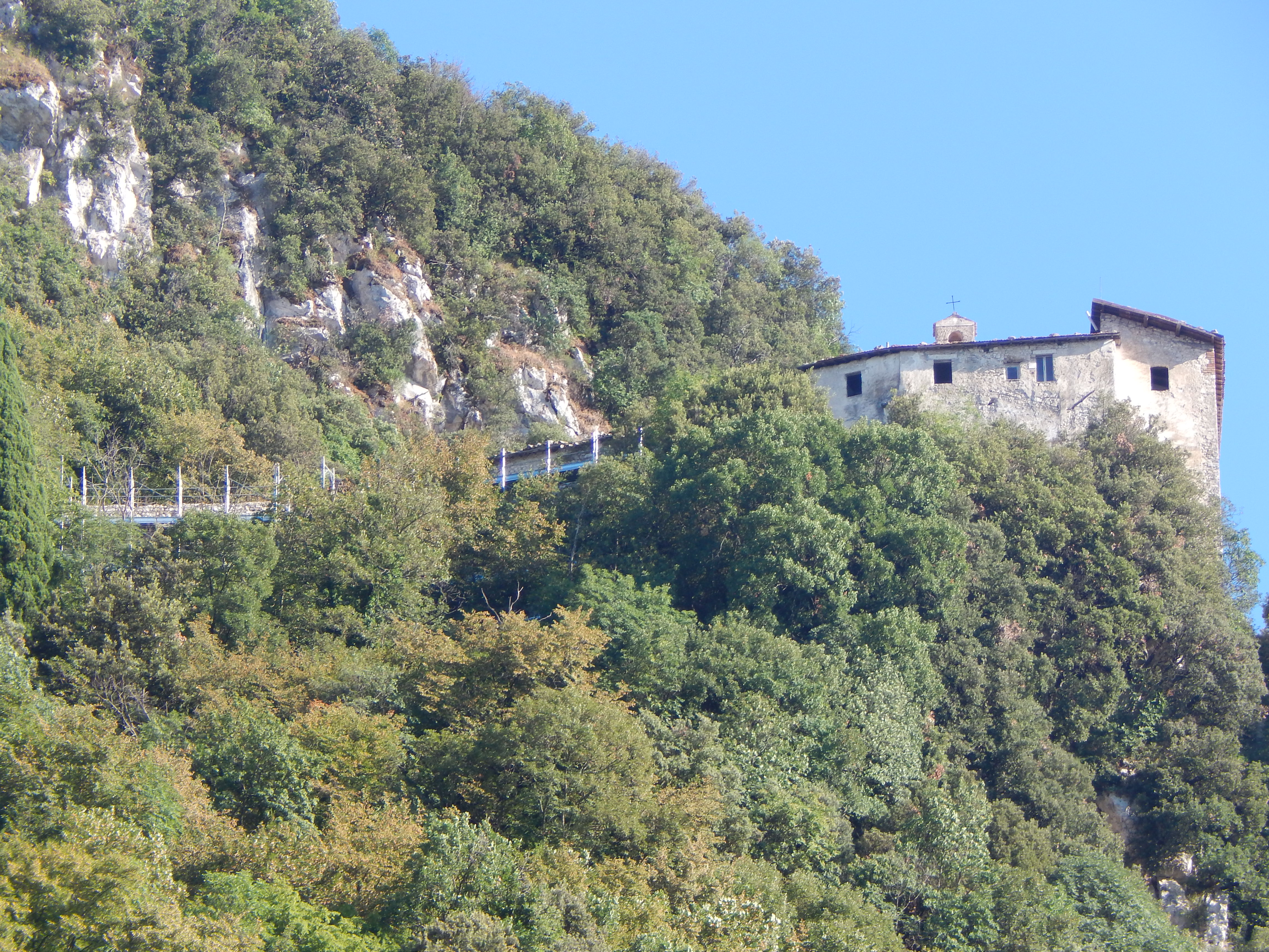 Chiesa di San Nicola - Scandriglia (provincia di Rieti, Lazio)